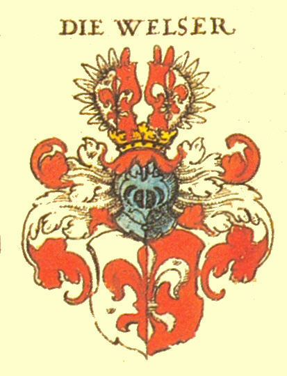 Stammwappen der Augsburger, Nürnberger und Ulmer Patrizierfamilie Welser